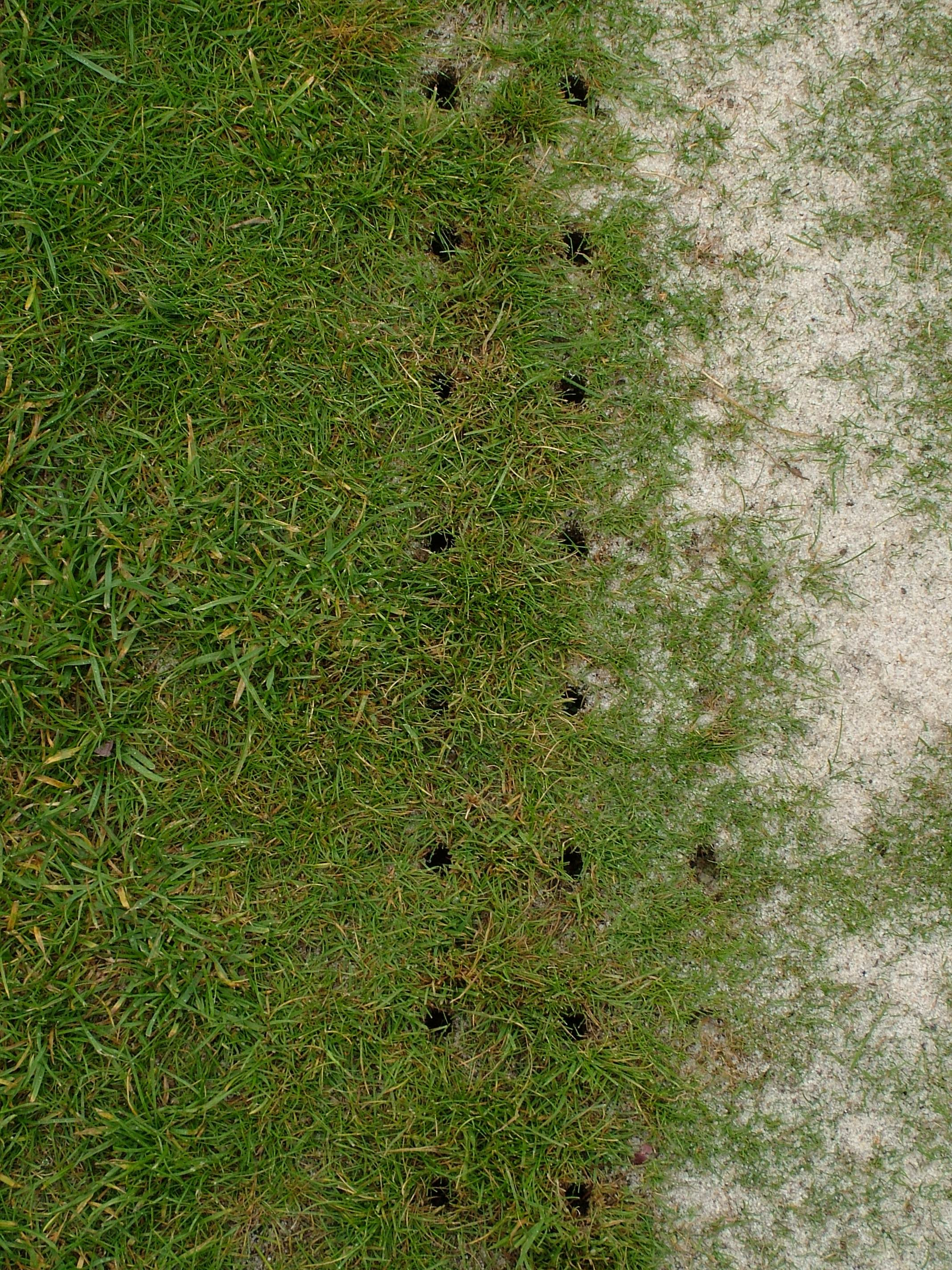 Aerifikace, pískování trávy, Atrium Golf Club Trhový Štěpánov, ATRGC